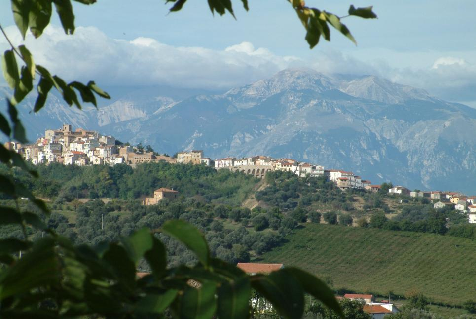 Dario Blues Di Nardo, opera propria, panorama di Torino di Sangro